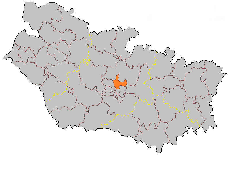 Кантон Амьен-8 (Нор) на карте департамента Сомма